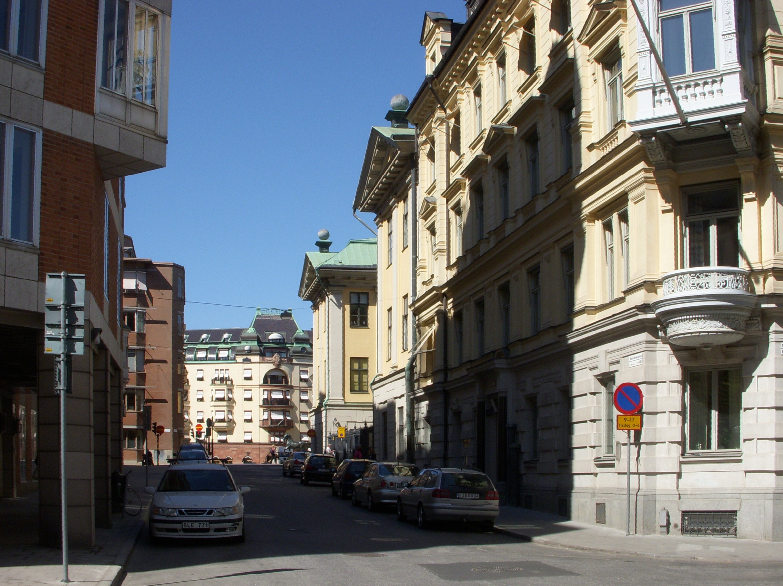 Blasiehomsgatan på Blasieholmen i Stockholm